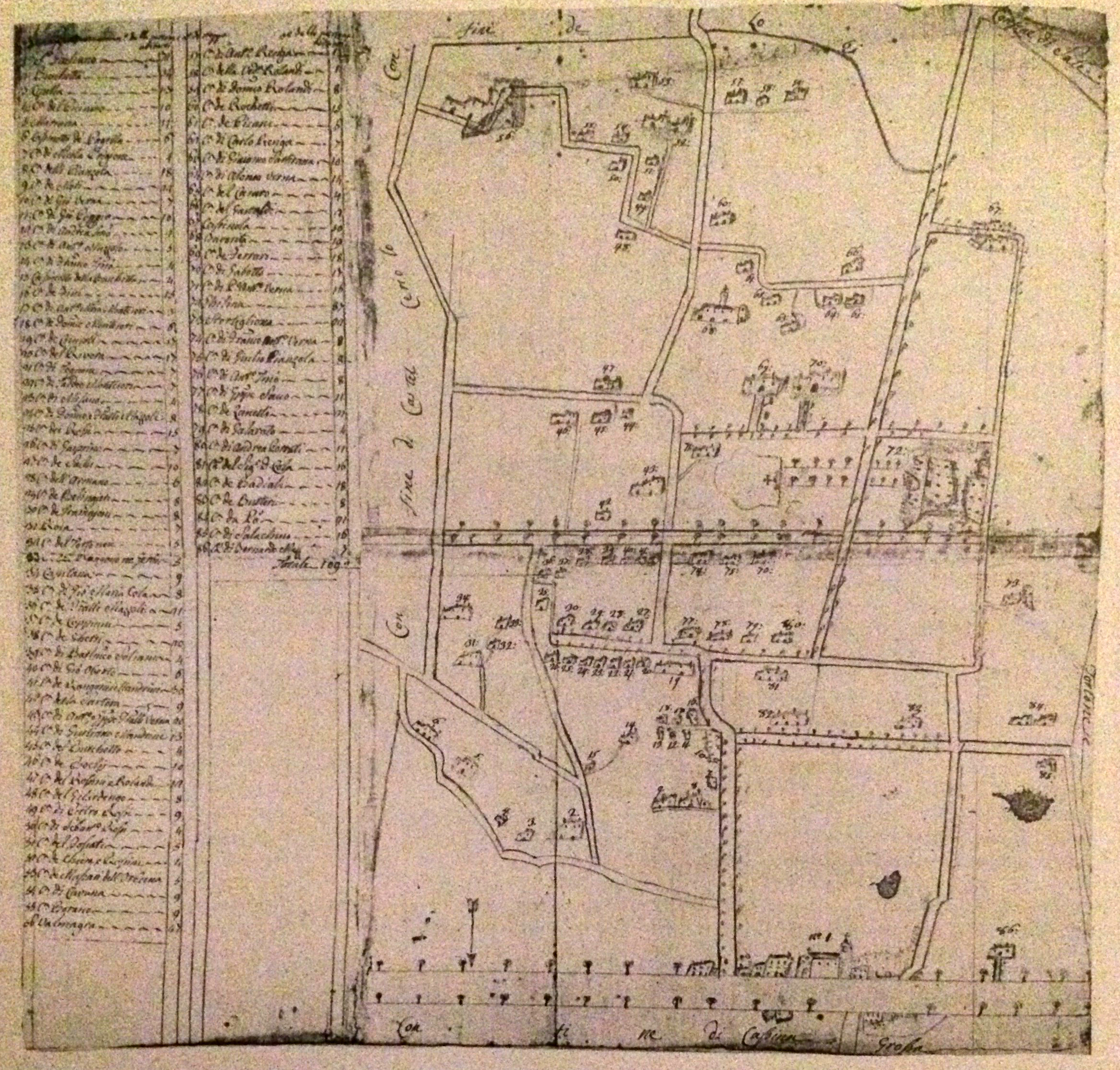 Pianta del territorio della parrocchia di San Giuliano nel XVIII secolo. In particolare evidenza, al n. 72, la tenuta "Ghilina" (Archivio Vescovile di Alessandria)